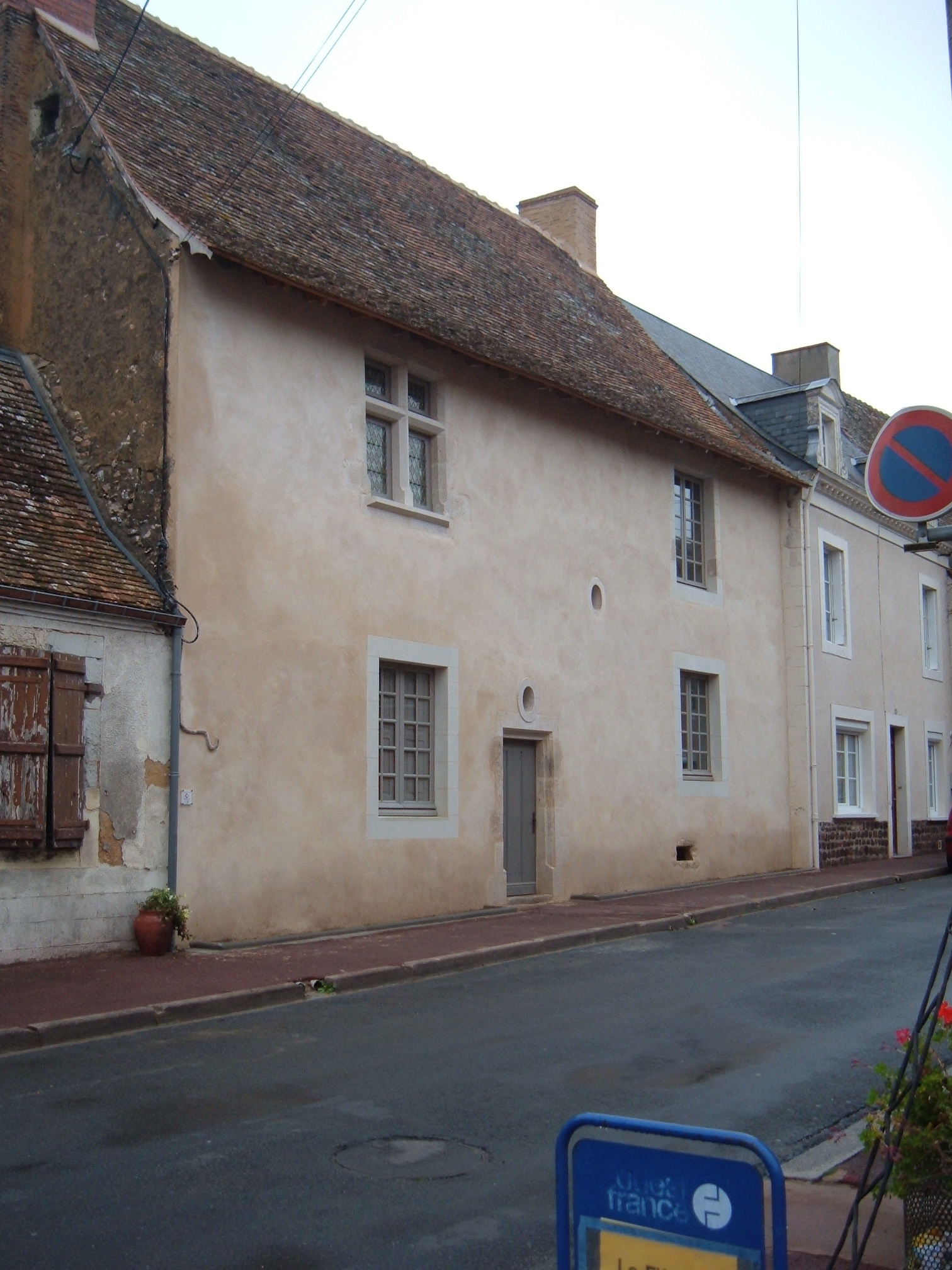 Ancienne auberge Courcelles la Forêt maison 15e siecle 2007